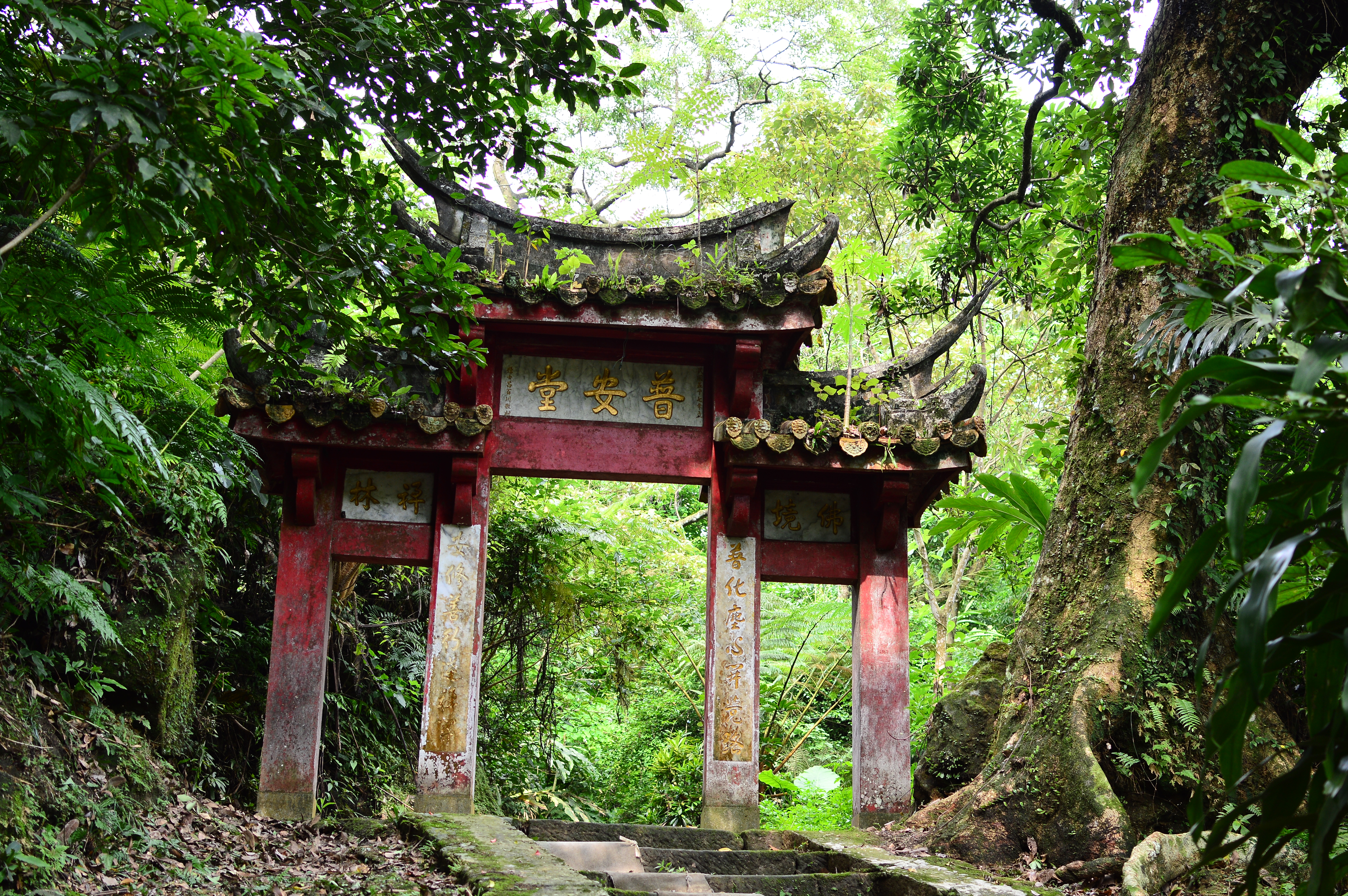 中文（台灣）: 土城普安堂門坊2017B